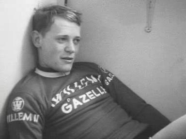 René Pijnen tijdens de Zesdaagse van Amsterdam van 1969.